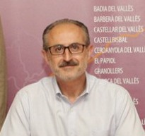 El alcalde de Mollet del Vallés